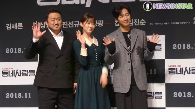 Ma Dong-seok, Kim Sae-ron y Lee Sang-yeob en la rueda de prensa de The Villagers